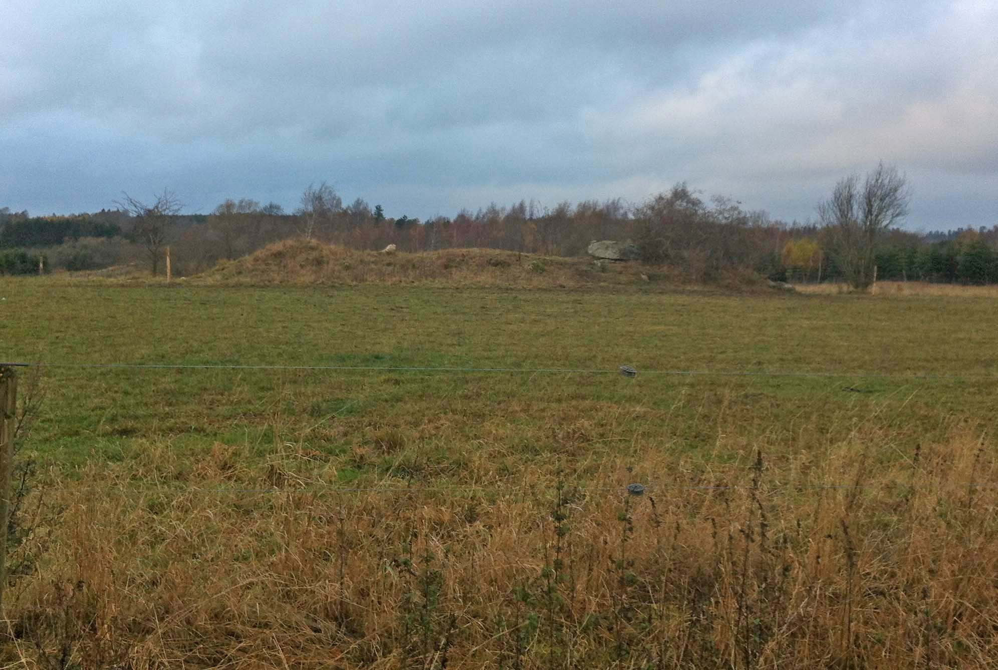 Langdysse i Døjringe